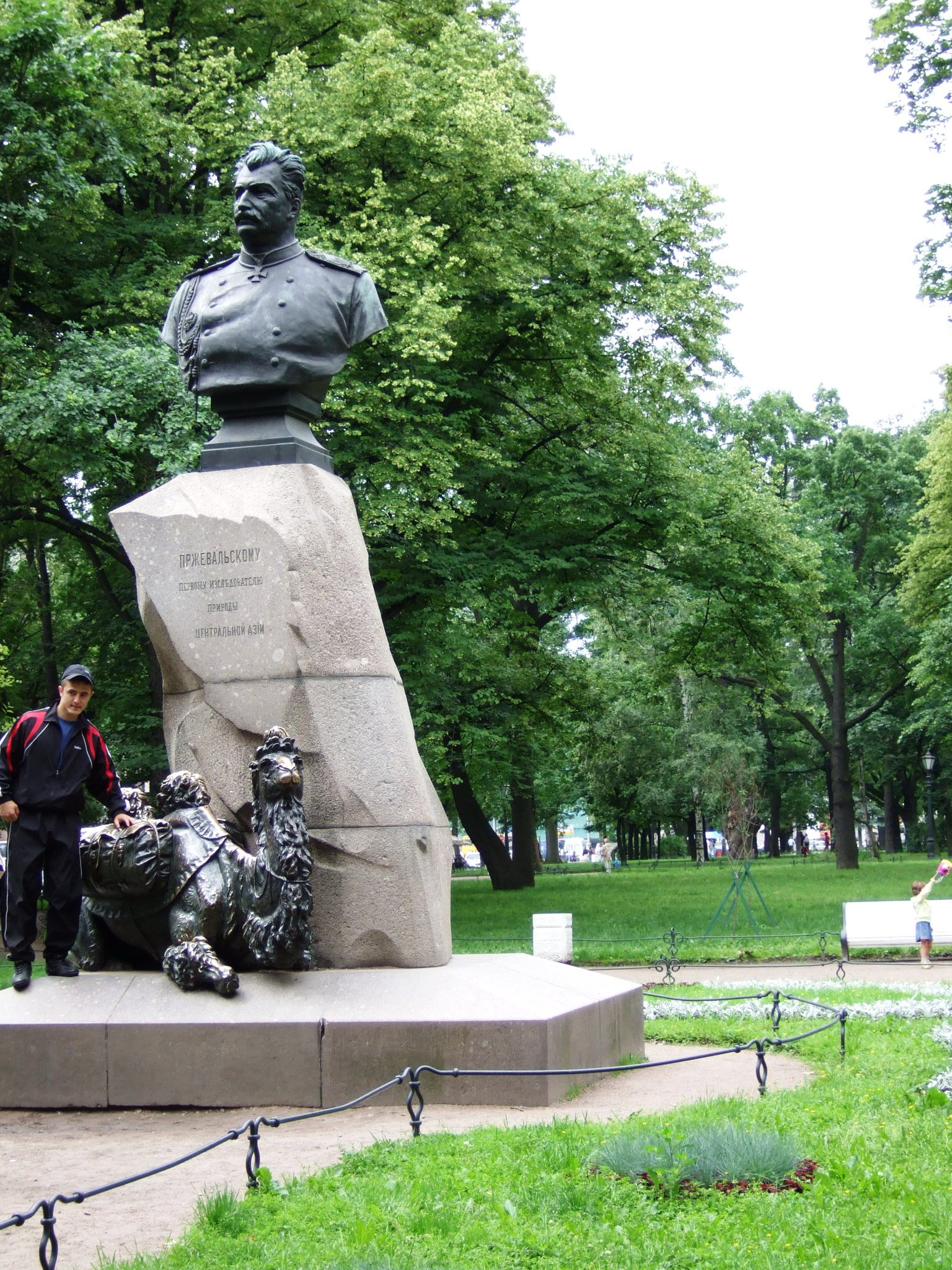 Monument to Nikolai Przhevalsky in Saint Petersburg